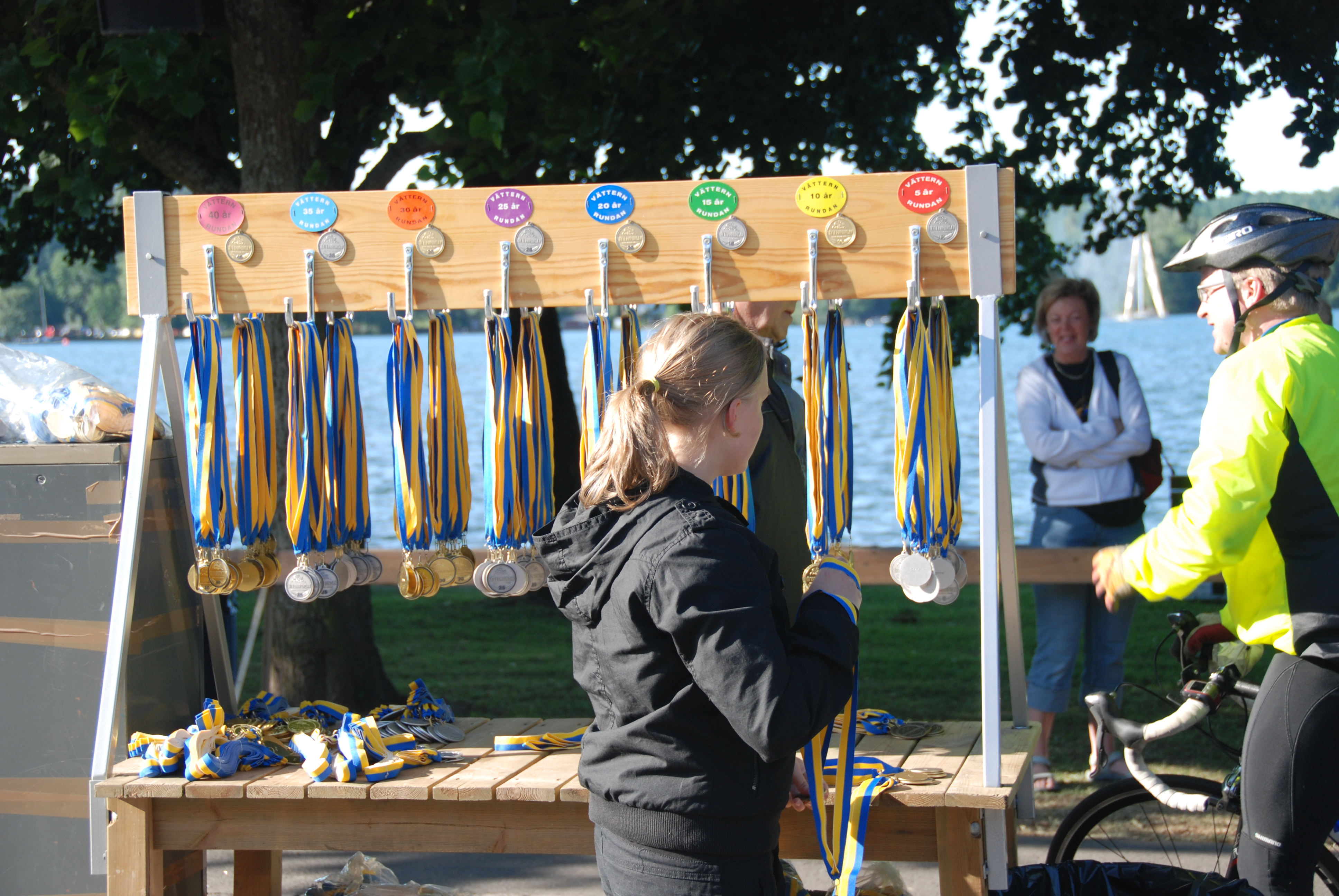 Vätternrundan, medaljer för deltagarna 2008